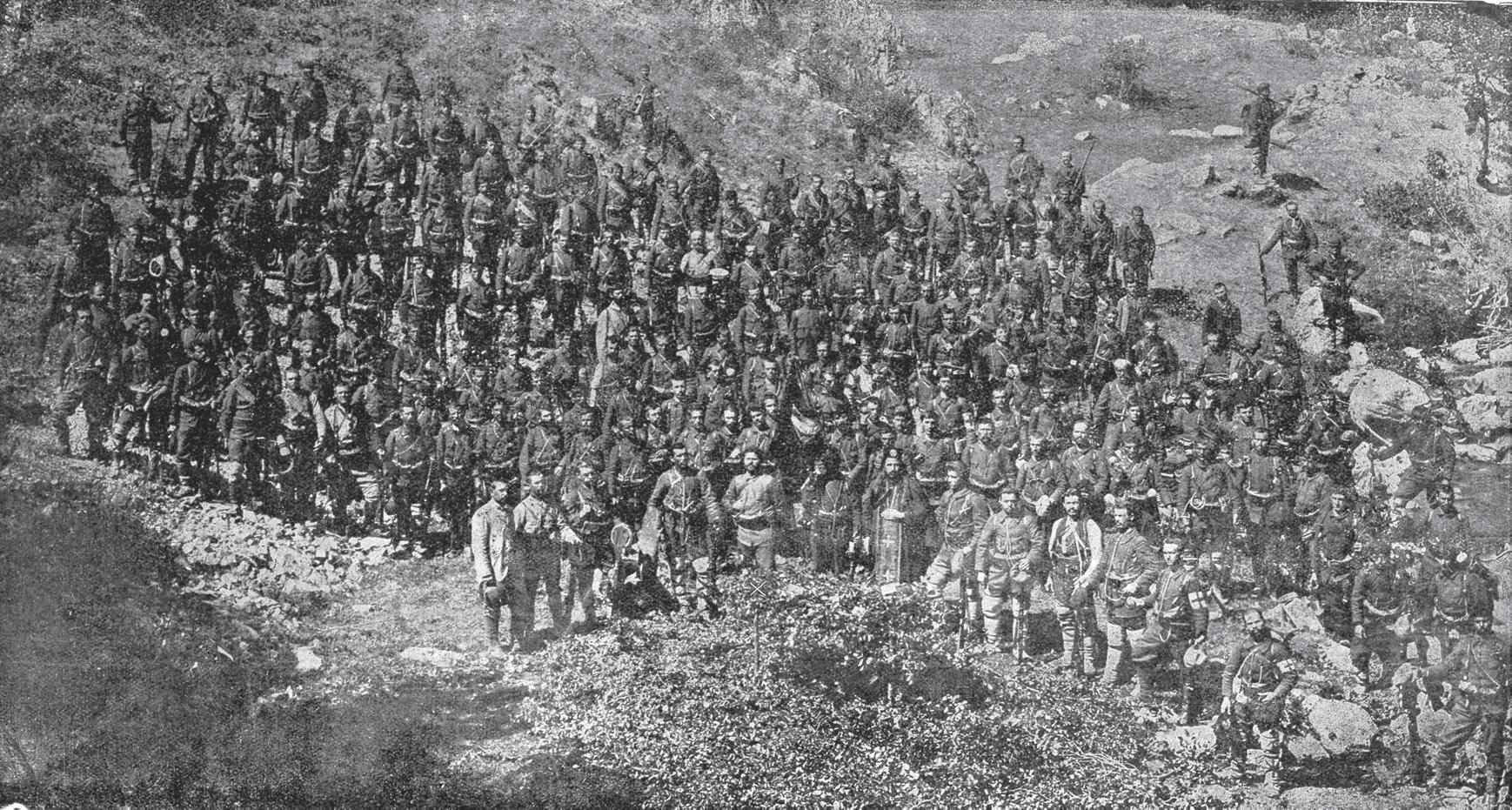 Церемония при освещаване на знамето и полагане на клетва от четите на Христо Чернопеев, Никола Жеков, Петър Самарджиев и Панайот Байчев